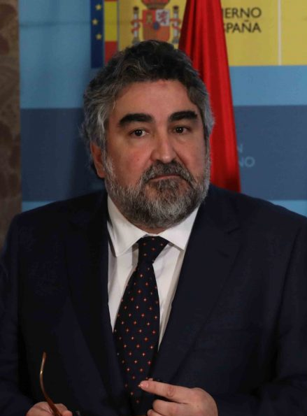 El delegado de Salud, Seguridad y Emergencias del Ayuntamiento de Madrid, Javier Barbero, se ha reunido esta mañana, lunes 2 de julio, con el delegado del Gobierno, José Manuel Rodríguez Uribes, en la Delegación de Gobierno de Madrid para preparar el dispositivo de seguridad adicional que se desplegará el próximo sábado 7 de julio con motivo de la manifestación del Orgullo 2018.